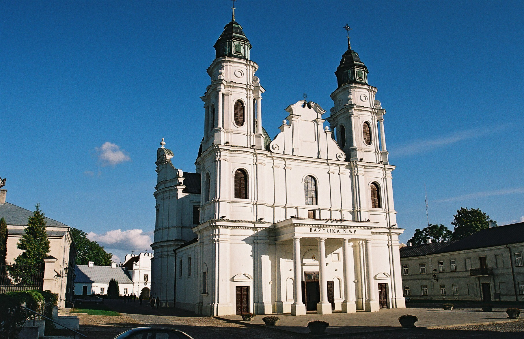 Chełm